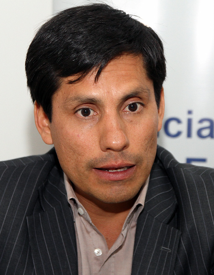 Quito, 22 de ene (ANDES).- El marchista y campeón olímpico Jefferson Pérez ofrece entrevista a ANDES. Fotografías: Carlos Rodríguez.